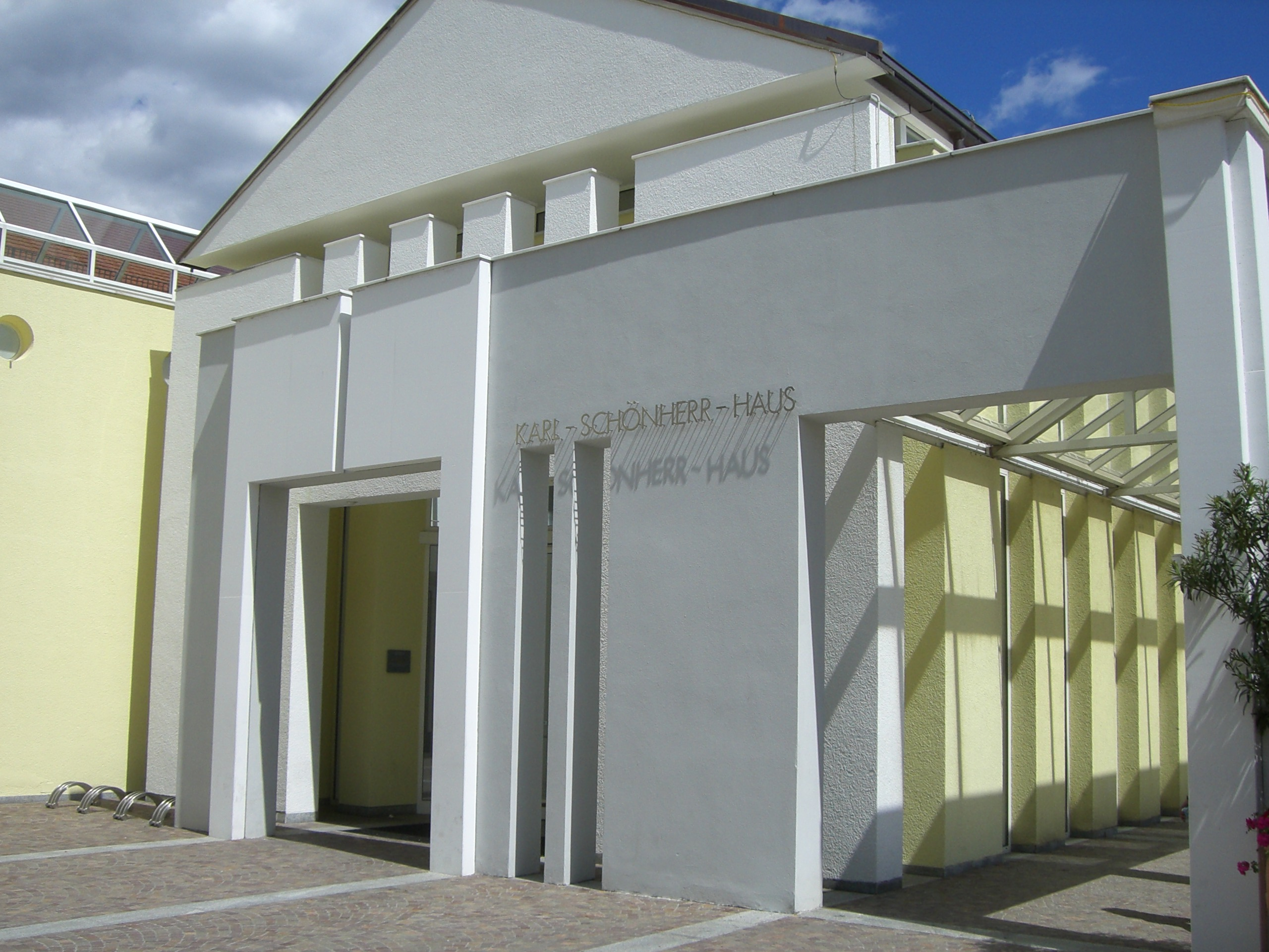 Karl Schönherr Gebäude in Schlanders